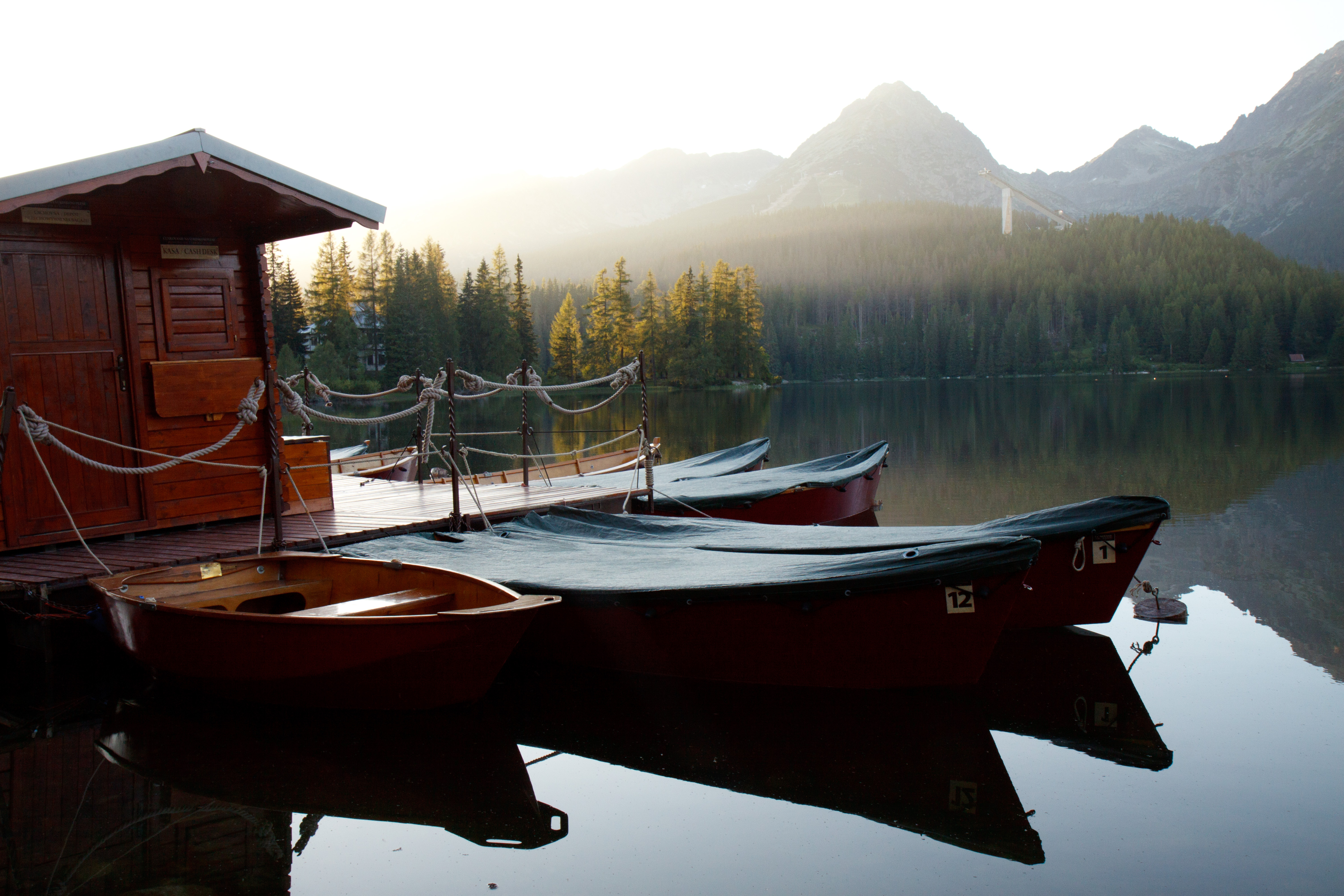 Štrbské pleso